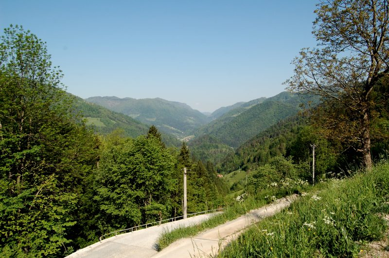 Idrijski prelom